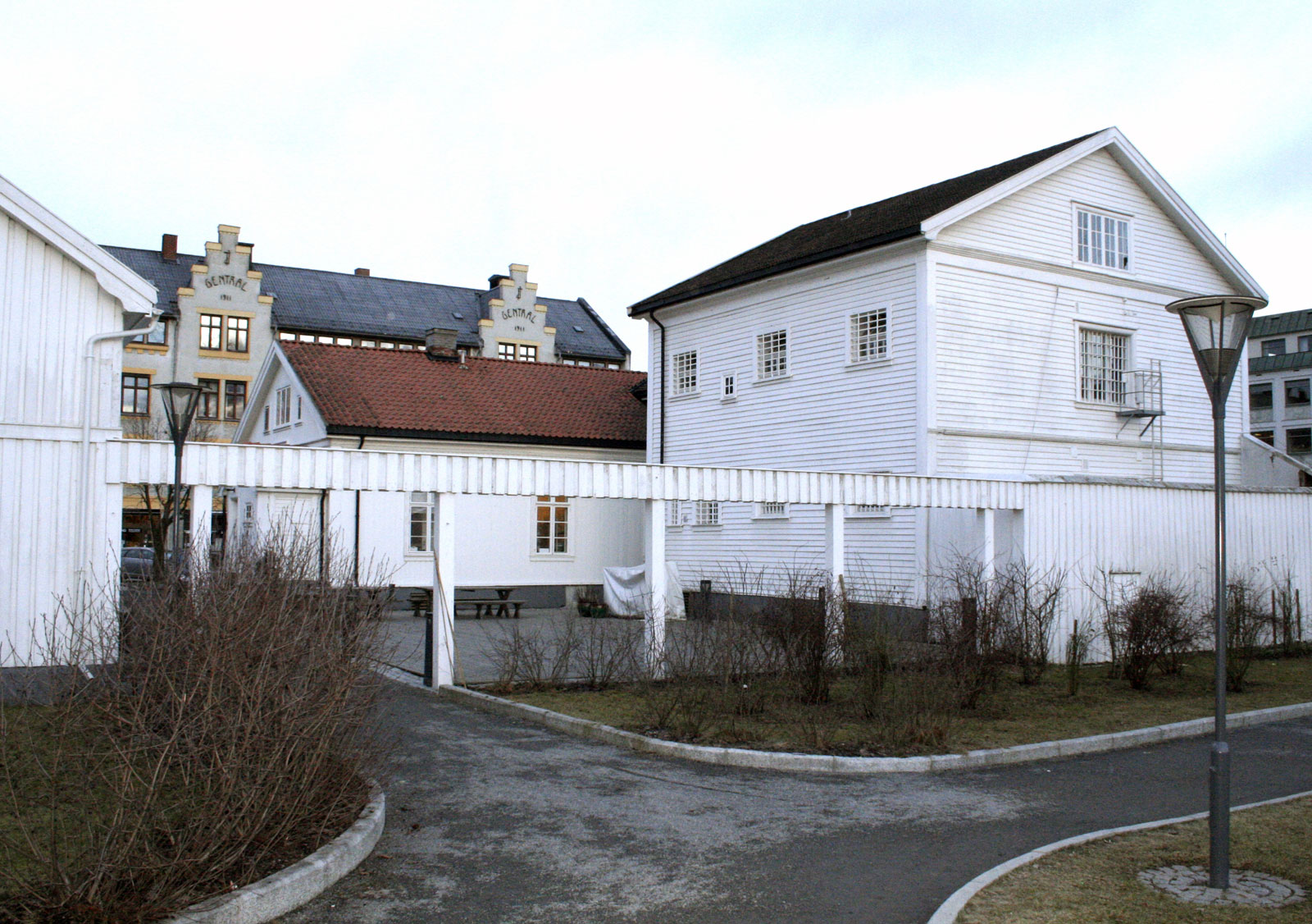 Hønefoss hjelpefengsel, fasade mot sør